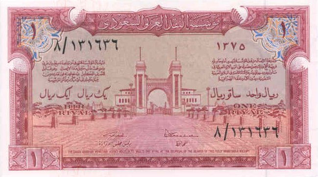 1 риал. Саудовская Аравия, 1956. Аверс.